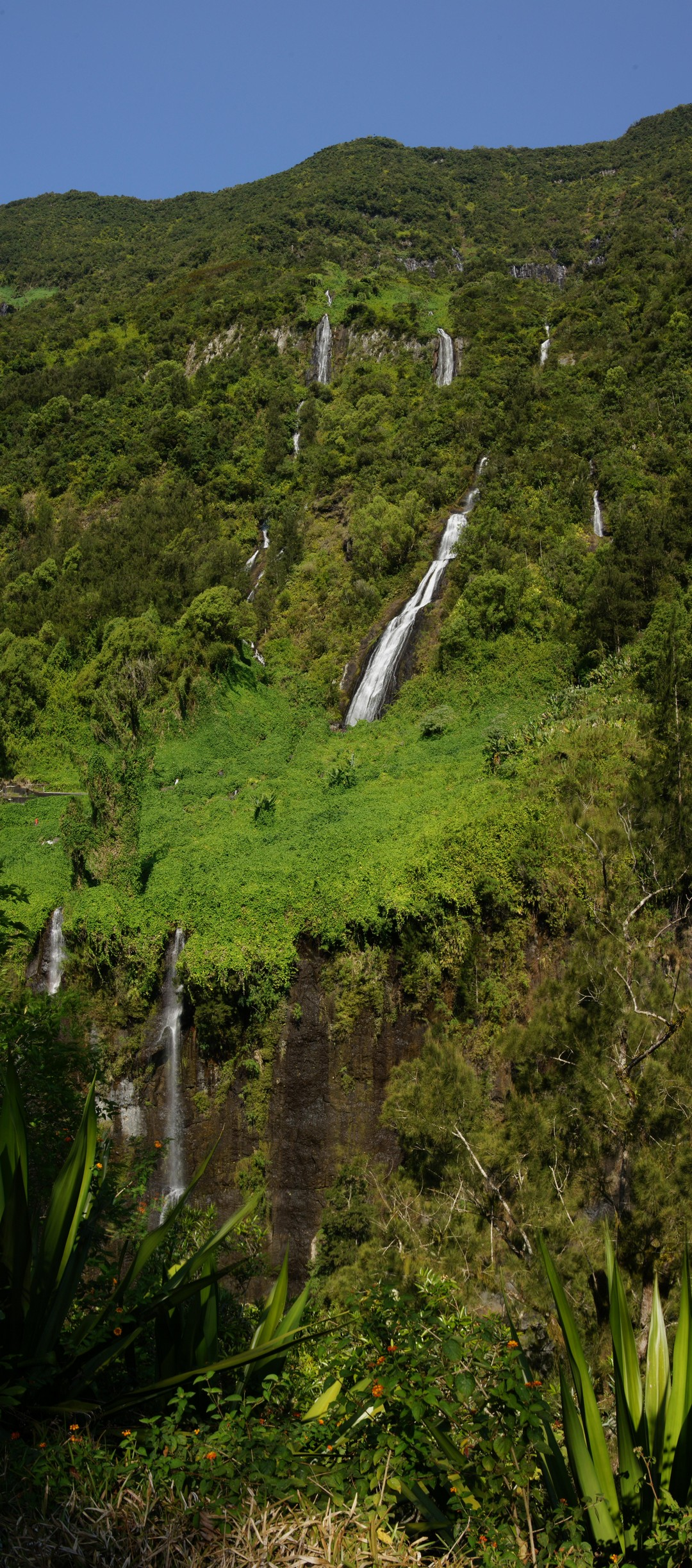 Le voile de la mariée vue de la D48, Commune de Salazie, Île de la Réunion. Cette photo a été réalisée à partir de 6 clichés assemblés entre eux...